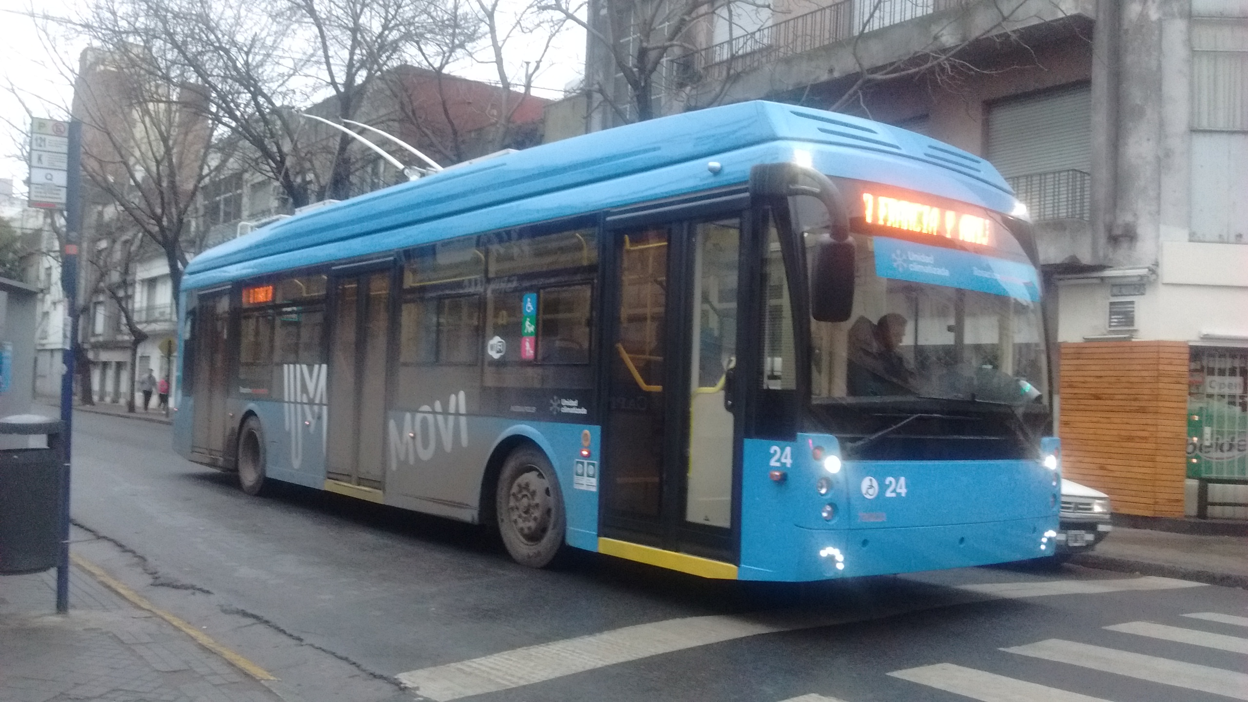 Coche Trolza Megapolis de la Línea Q de trolebuses rosarinos